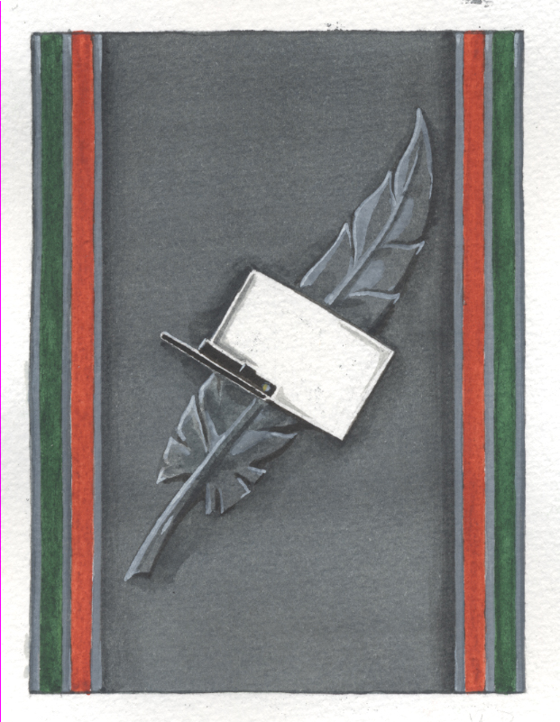 insigne non officiel de Képi blanc magazine